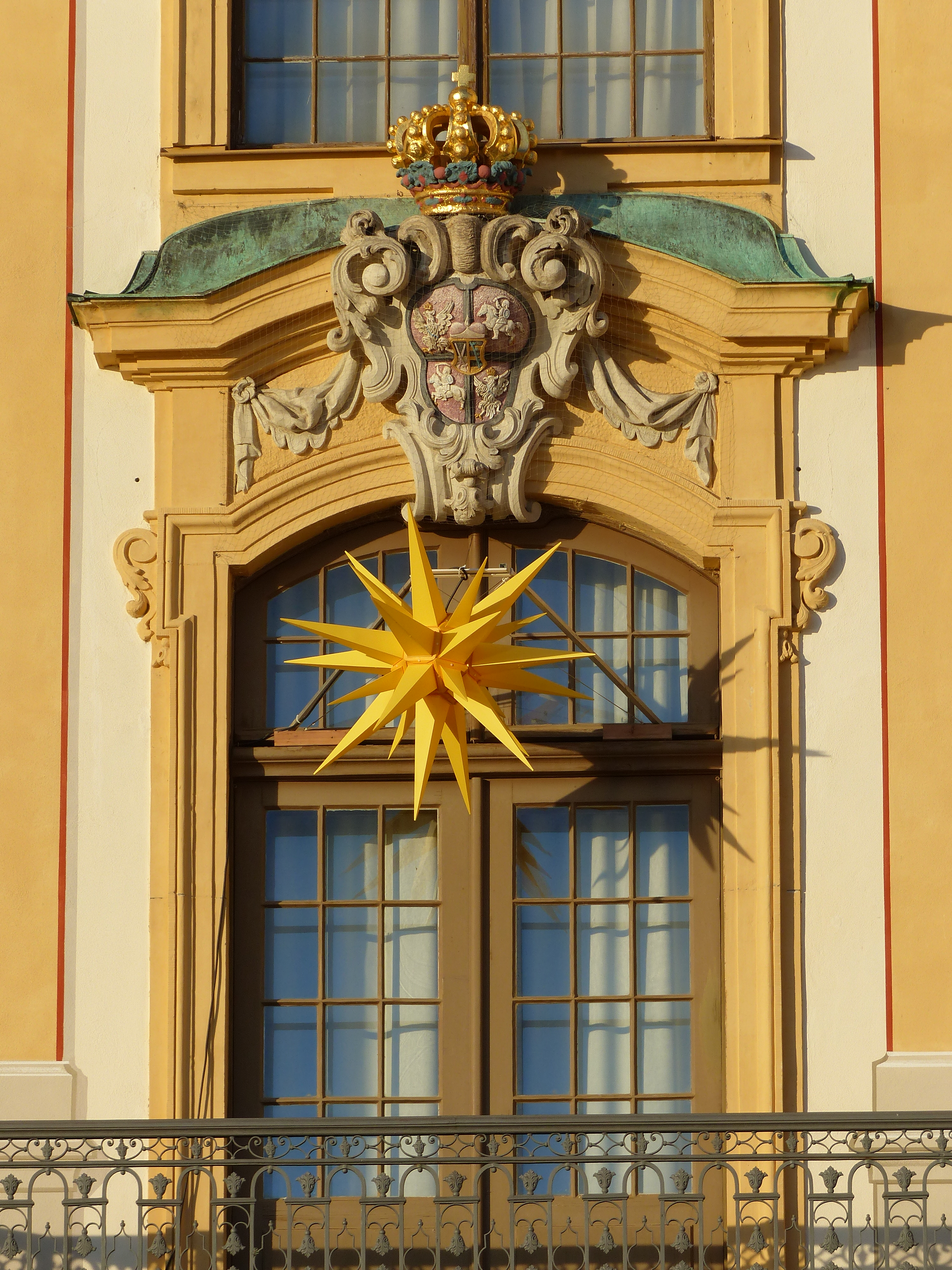 Schloss Moritzburg im Winter